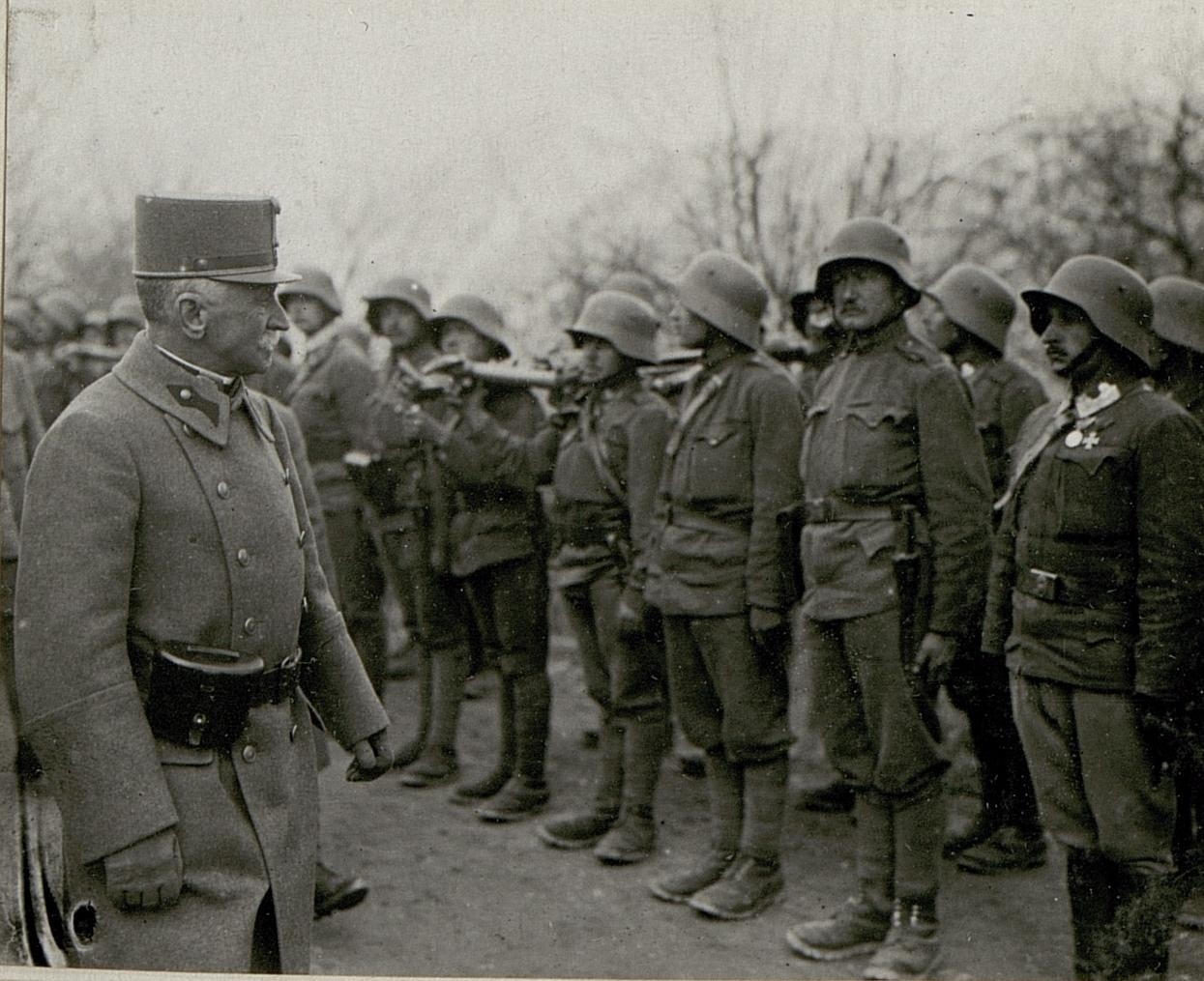 Inspizierung der MG-Kompanie desSturmbataillons durch Exzellenz Conrad v.Hötzendorf